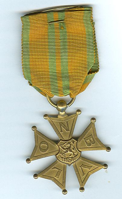 Vierdaagsekruis van vóór 1959 Het vierdaagsekruis van Tjeerd van Hoogen